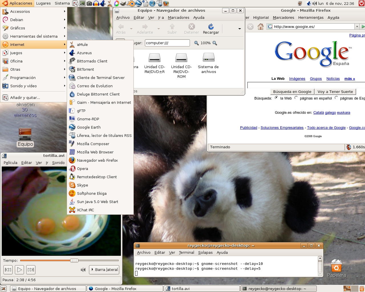 Se trata de una captura de pantalla de mi escritorio, tomando varias de las características de Gnome 2.16 y mostrando su lado más divertido.